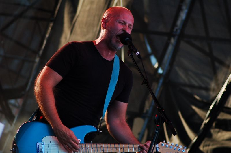 Bob Mould (former singer of Hüsker Dü)